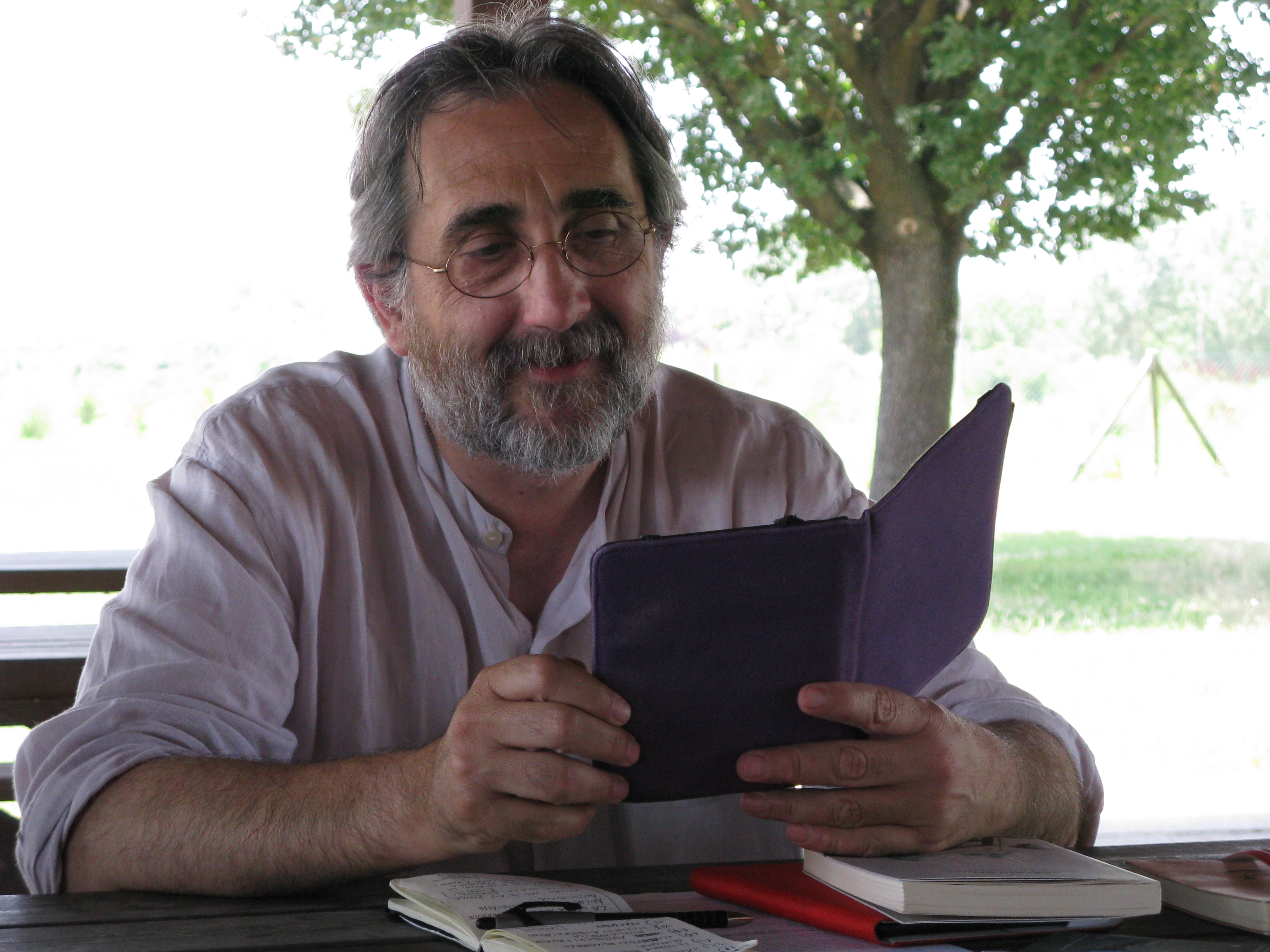 Michele Marziani ad Argenta durante il Giro d'Italia in 80 librerie